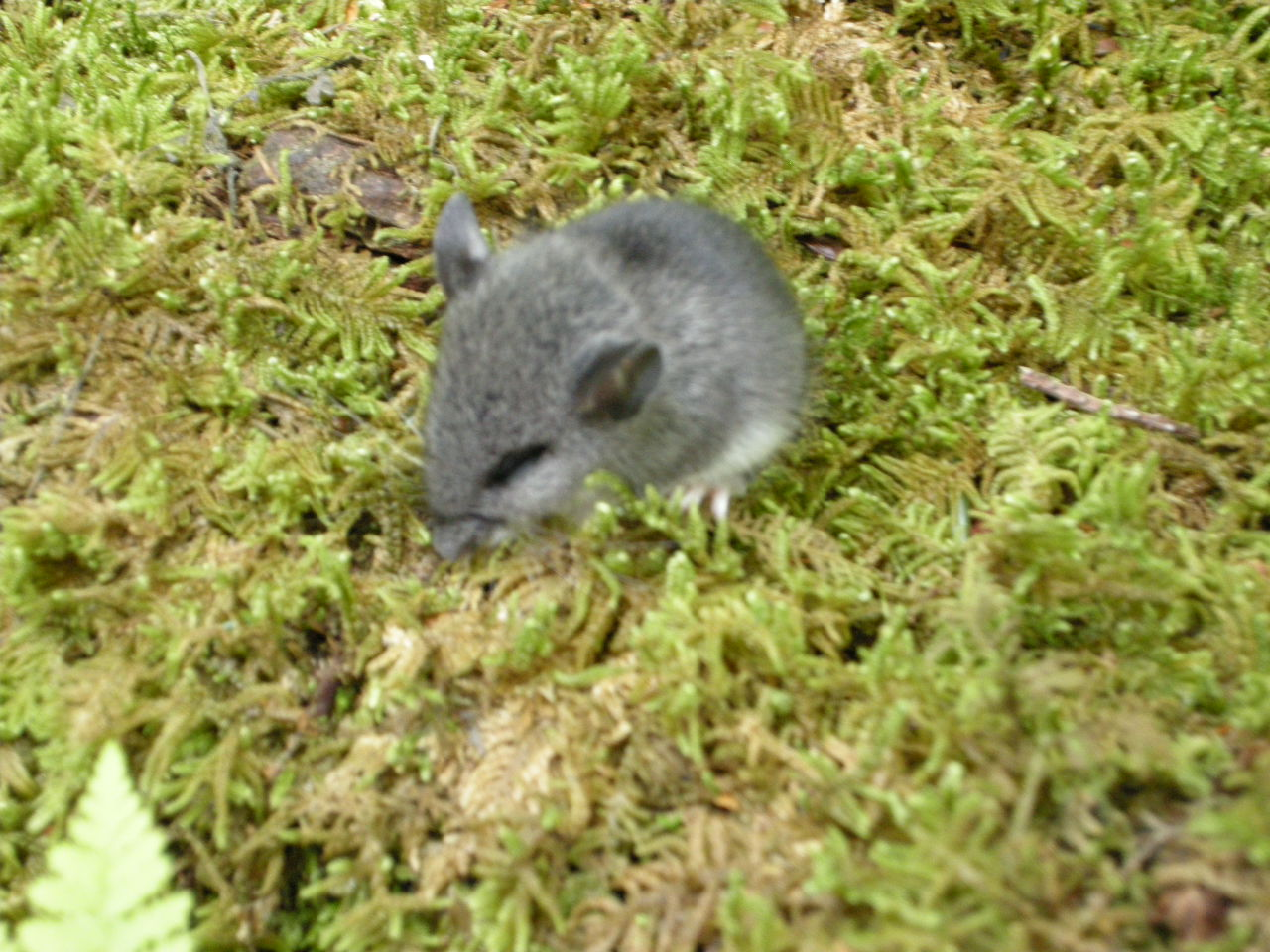 Juvenile deer mouse (?)